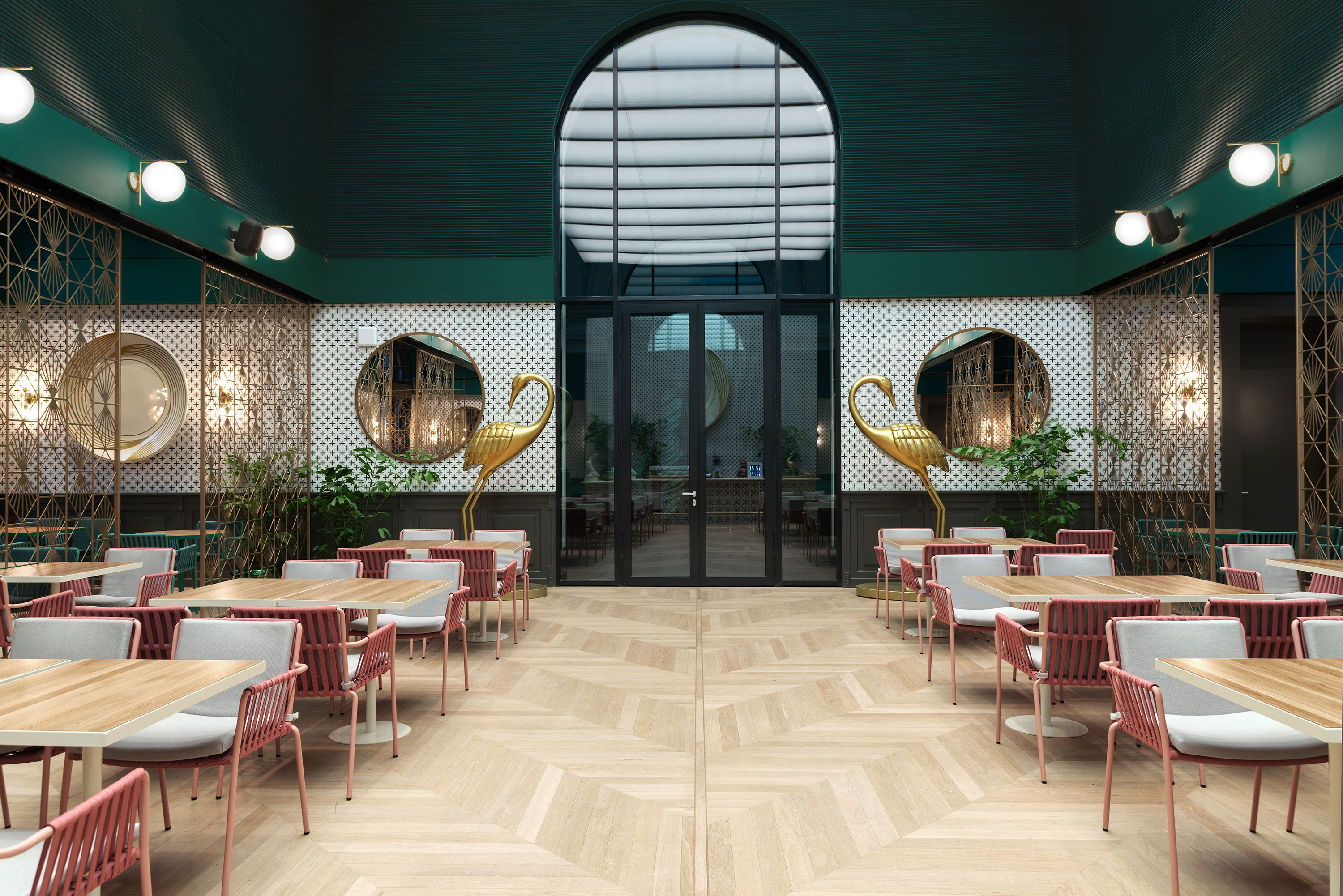 Millenium háza